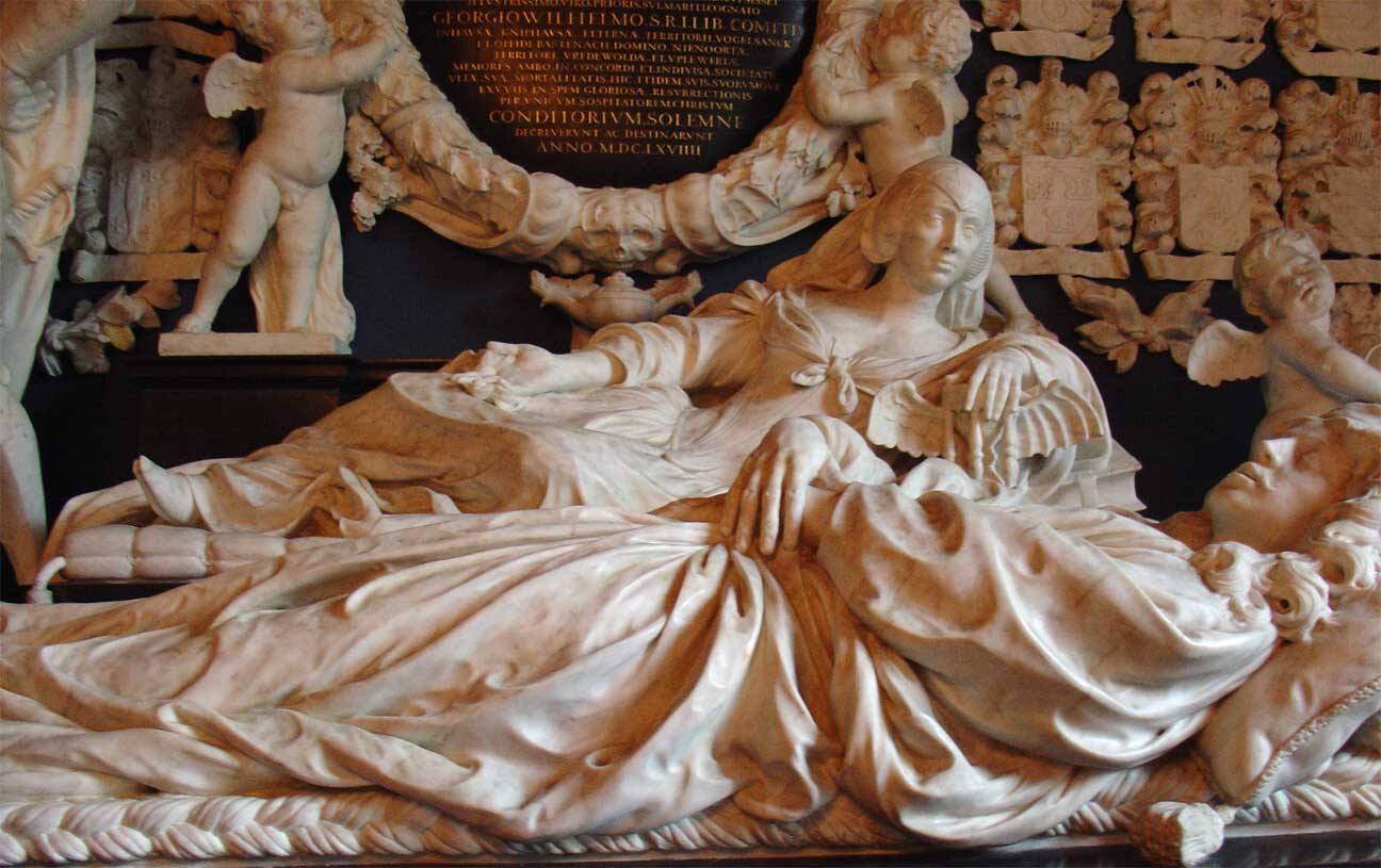 Detail van het praalgraf in de kerk van Midwolde van Rombout Verhulst